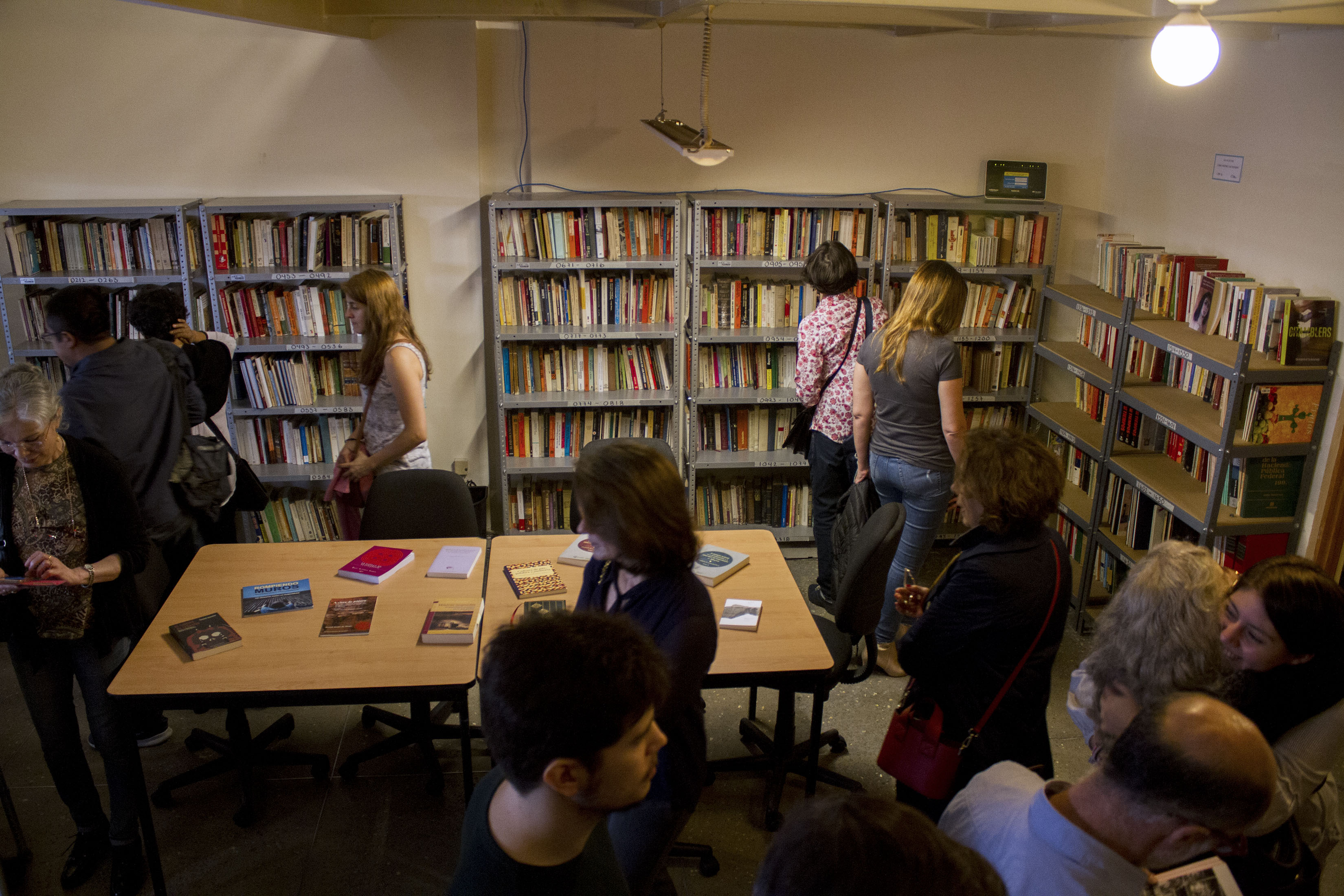 En la Casa Refugio Citlaltépetl, se inauguró el Libro Club y la Biblioteca Memorial 19 de Septiembre, formada a partir de los libros rescatados del edificio de Ámsterdam 107, derrumbado en los sismos de 2017. Durante el acto, el Secretario de Cultura de la CDMX, Eduardo Vázquez Martín realizó la entrega de reconocimientos a médicos y vecinos que participaron en la ayuda comunitaria y en el rescate de libros de la casa de Lorna Martínez Skossowska durante el sismo del año pasado. Fotografía: Maritza Ríos / Secretaría de Cultura CDMX